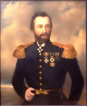 portret uit 1859 door C.L. Loder. Doek 89 x 73 cm (Particulier bezit)